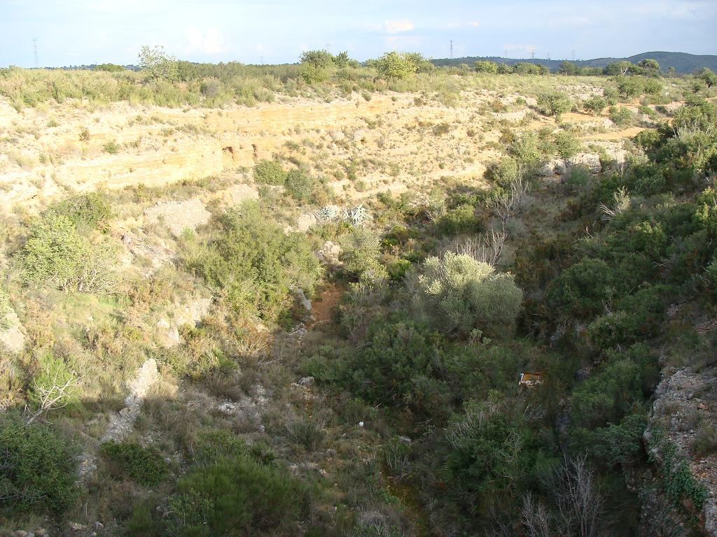 Una de las ramblas que baja de la Sierra del Caballón, en el término municipal de Catadau (Valencia) y que se convierte poco después en el llamado Riu Sec (Río Seco) el cual se pierde entre los campos cultivados de la Ribera Alta, cerca de Benimodo